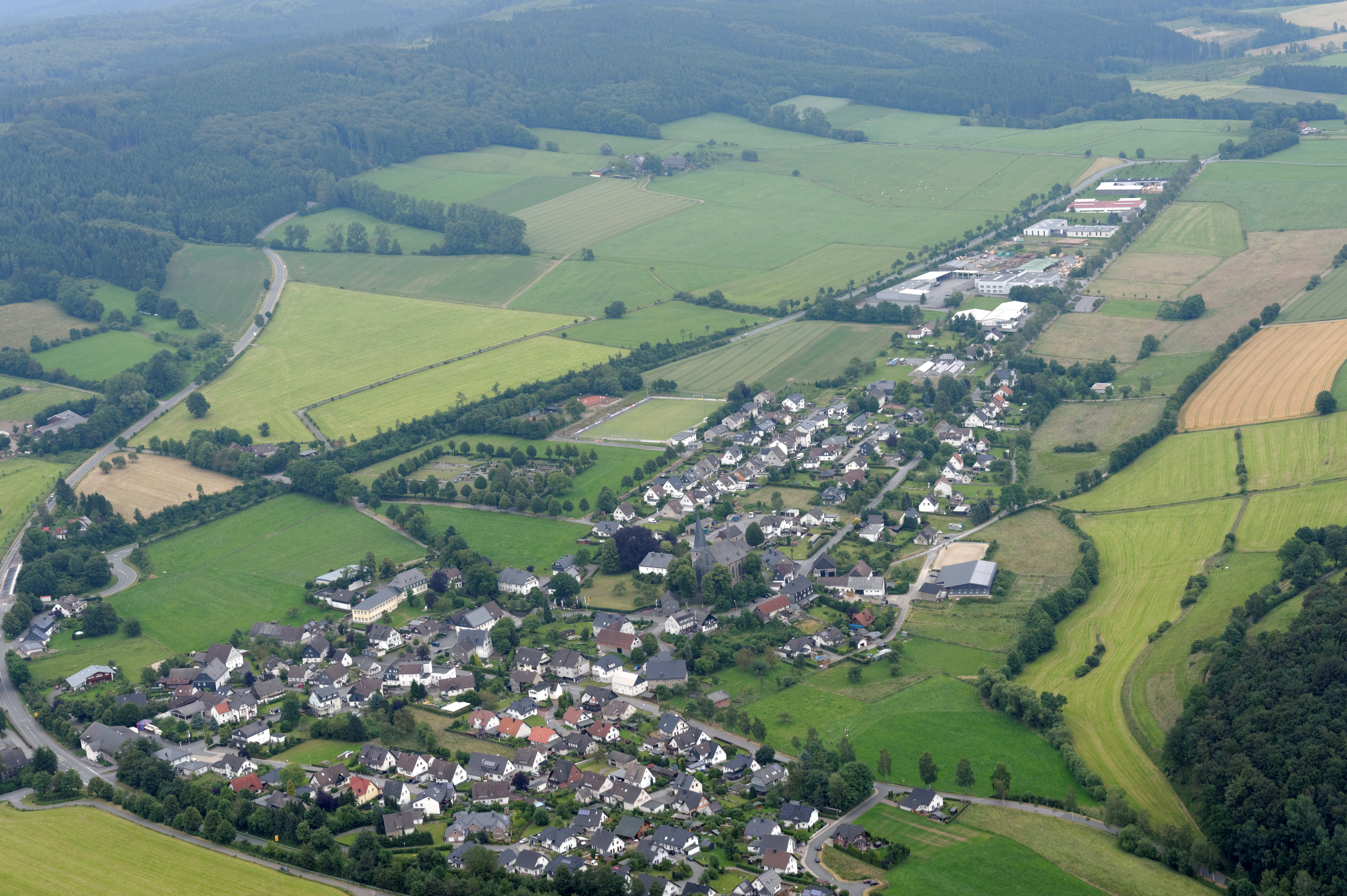 Fotoflug Sauerland-Nord. Sundern (Sauerland): Ortschaft Hellefeld mit Landschaftsschutzgebiet Hellefelder Senke​ ums Dorf. The making of this document was supported by the Community-Budget of Wikimedia Germany.